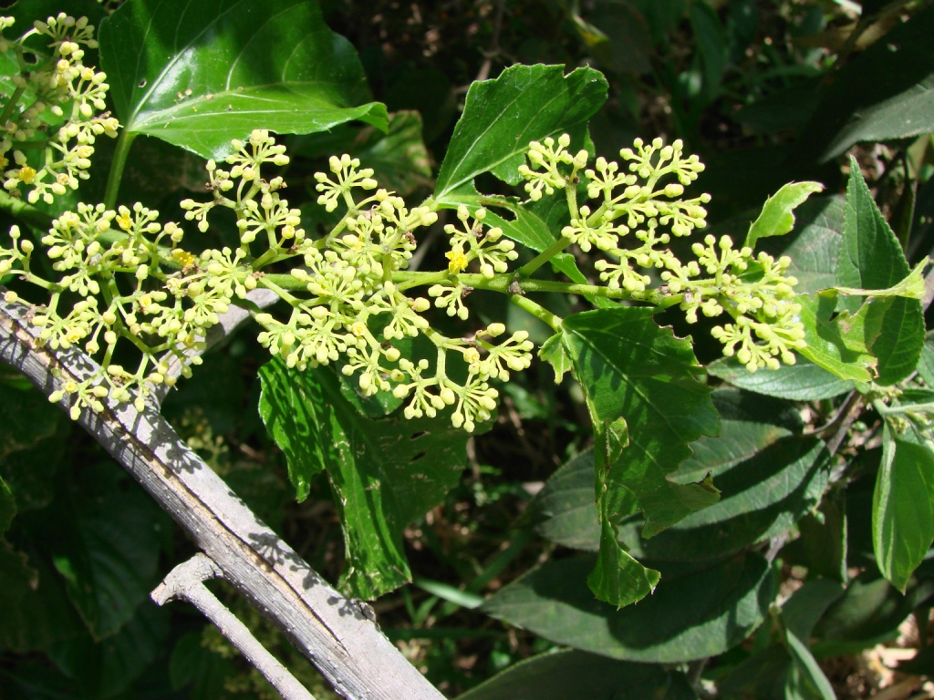 Cissus verticillata - VITACEAE Parque Olhos D'Água - Brasília - Distrito Federal - Brasil.